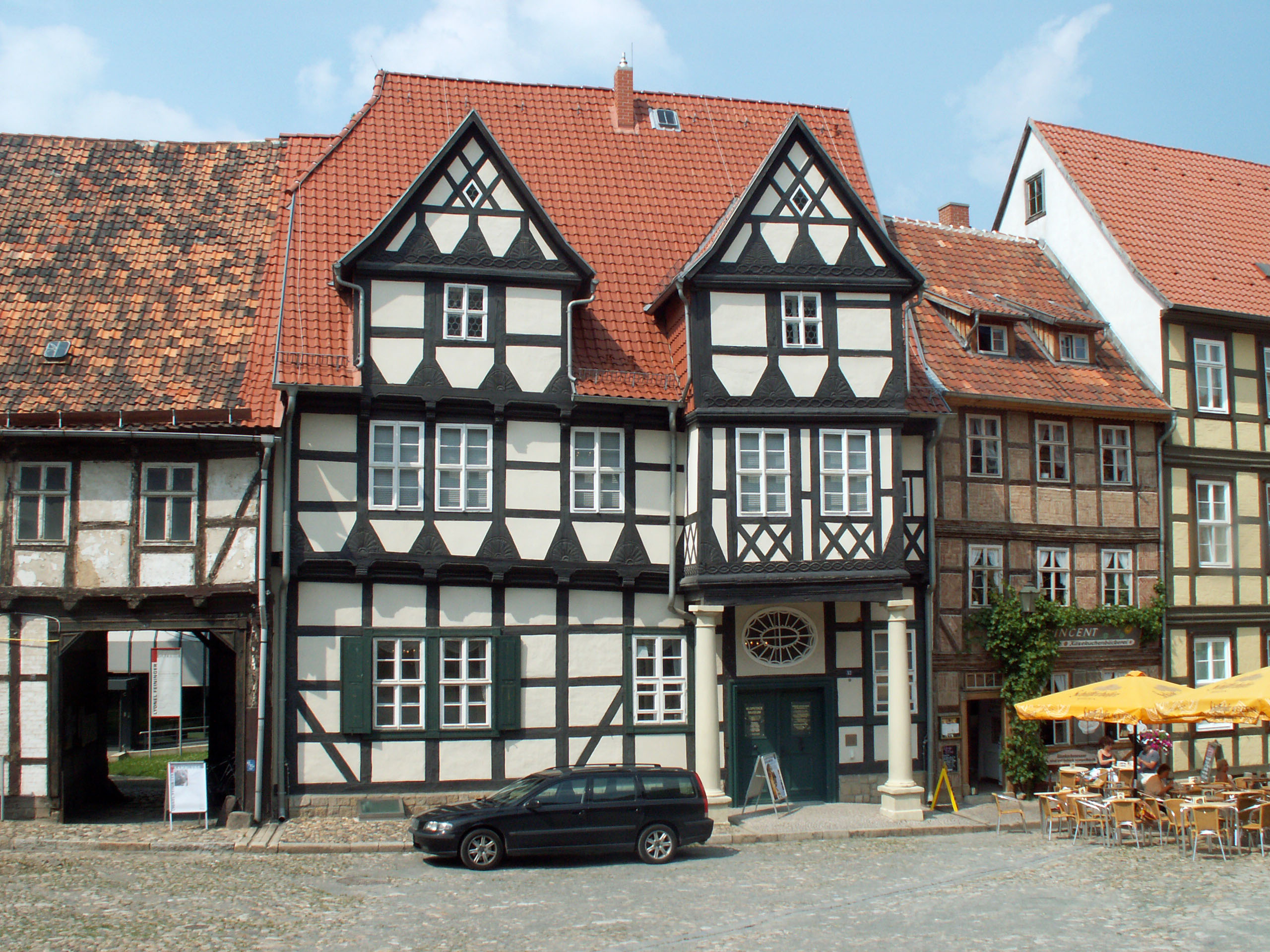 Aufgenommen auf einem Stadtrundgang durch die UNESCO Kulturerbestadt Quedlinburg.